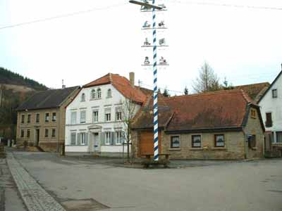 Ortsteil Finkenbach